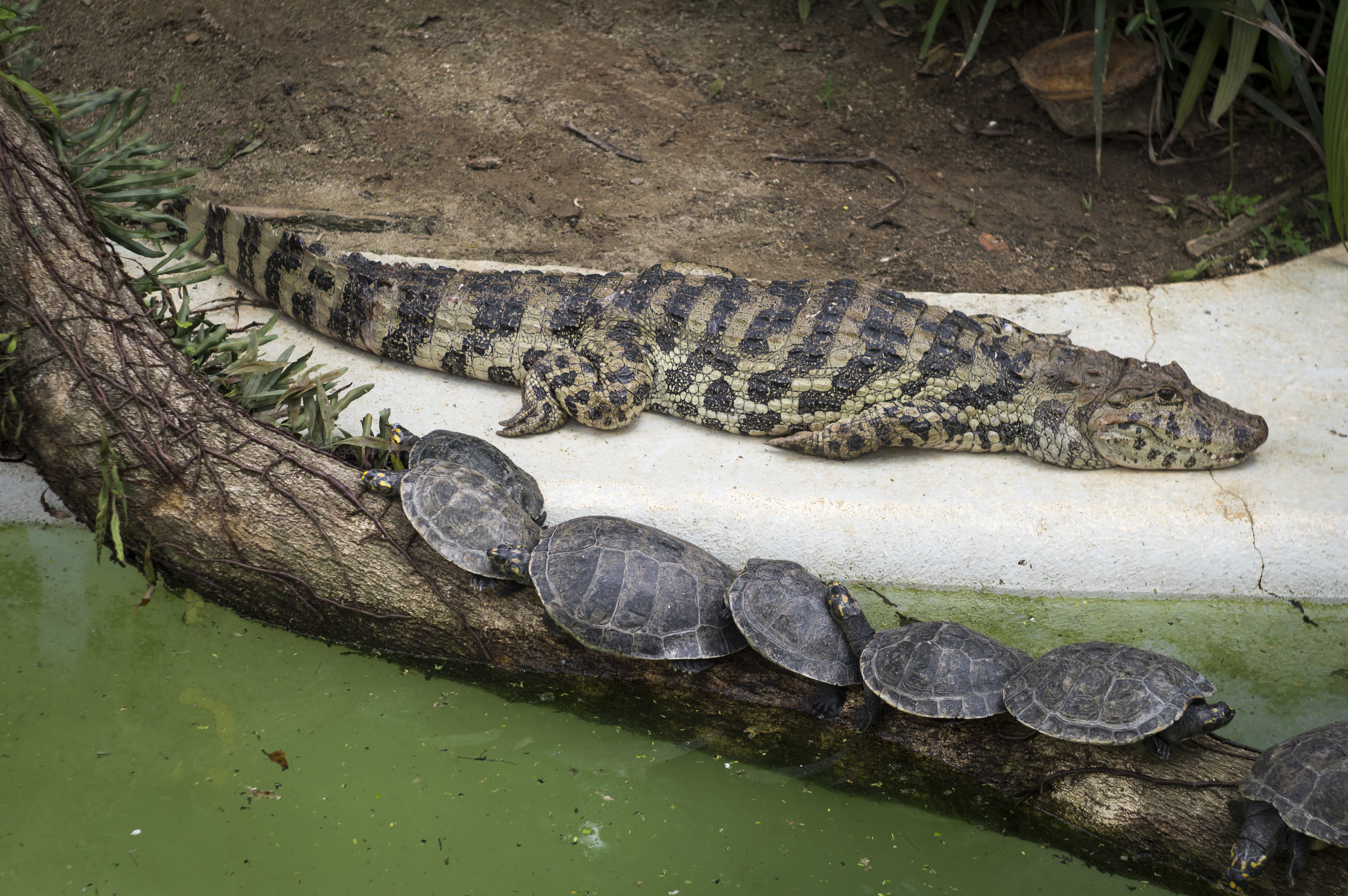 JACARÉ DE PAPO AMARELO / BROAD-SNOUTED CAIMAN ORDEM / Order: Crocodylia FAMÍLIA / Family: Alligatoridae NOME POPULAR / Popular name: Jacaré-de-papo-amarelo NOME EM INGLÊS / English name: Broad-snouted caiman NOME CIENTÍFICO / Scientific name: Caiman latirostris DISTRIB. GEOGRÁFICA / Geographical distribution: Leste do Brasil (do Rio Grande do Norte ao Rio Grande do Sul), Uruguai, norte e nordeste da Argentina, Paraguai e leste da Bolívia (Eastern Brazil (Rio Grande do Norte to Rio Grande do Sul), Uruguay, northern and northeastern Argentina, Paraguay and eastern Bolivia) HÁBITOS ALIMENTARES / Eating habits: Carnívoro (Carnivorous) REPRODUÇÃO / Copulation: 17 a 50 ovos por postura, que eclodem após 70 a 80 dias de incubação (17-50 eggs per clutch, which hatch after 70-80 days of incubation) PERÍODO DE VIDA / Lifecycle: Aproximadamente 50 anos - (About 50 years) HABITAT: Brejos, mangues, lagoas, riachos e rios (Marshes, swamps, ponds, streams and rivers) TARTARUGA DA PENÍNSULA / FLORIDA COOTER TURTLE ORDEM / Order: Testudines FAMÍLIA / Family: Emydidae NOME POPULAR / Popular name: Tartaruga-da-península NOME EM INGLÊS / English name: Florida Cooter NOME CIENTÍFICO / Scientific name: Pseudemys floridana DISTRIB. GEOGRÁFICA / Geographical distribution: Sudeste dos Estados Unidos, desde Virginia ao sul da Flórida (Southeastern United States, from Virginia to South Florida) HÁBITOS ALIMENTARES / Eating habits: Os juvenis são onívoros, alimentando-se de vegetais e de animais de pequeno porte. À medida que crescem, se tornam praticamente herbívoros (Juveniles are omnivorous, feeding on plants and small animals. As they grow, they become virtually herbivores) REPRODUÇÃO / Copulation: Ovíparo, desova de 12 e 20 ovos no início do verão (Oviparous, spawning 12 to 20 eggs in early summer) PERÍODO DE VIDA / Lifecycle: ? HABITAT: Água parada, como pântanos, brejos e lagoas. (tanding water, such as swamps, marshes and ponds.)